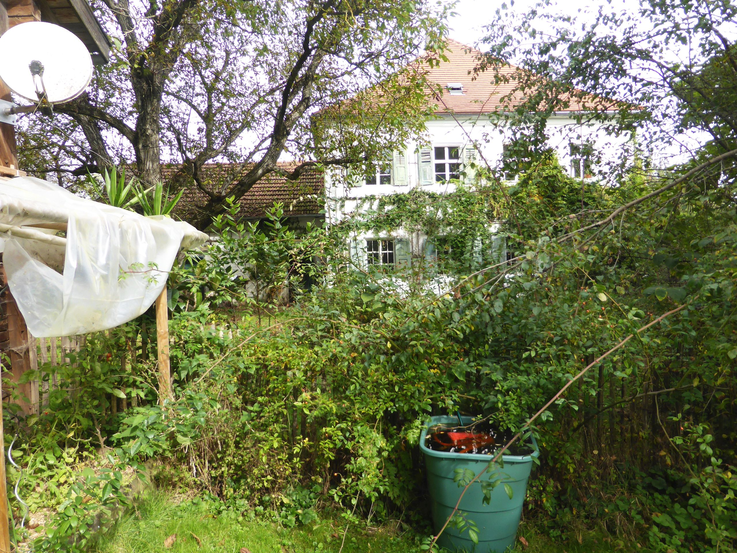 Angerbach 14